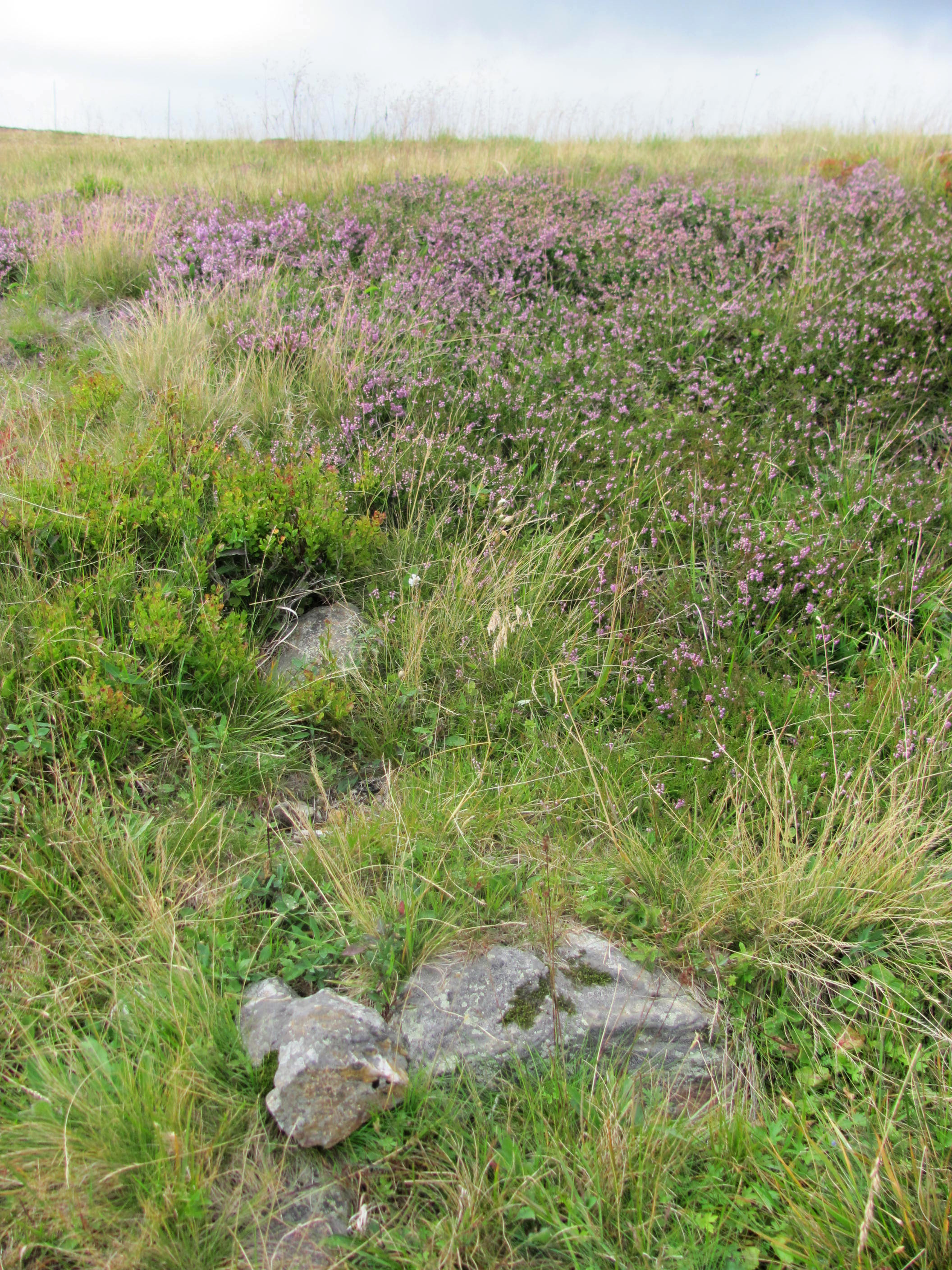 Vřes v Modrém sedle, Krkonoše